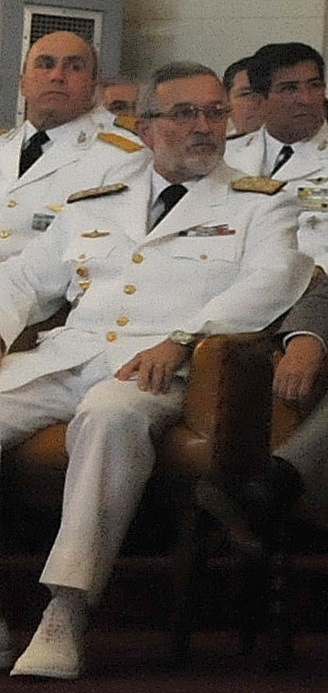 Almirante Daniel Martín, en el Colegio Militar de la Nación en la ceremonia de egreso de los nuevos subtenientes, guardiamarinas y alféreces.